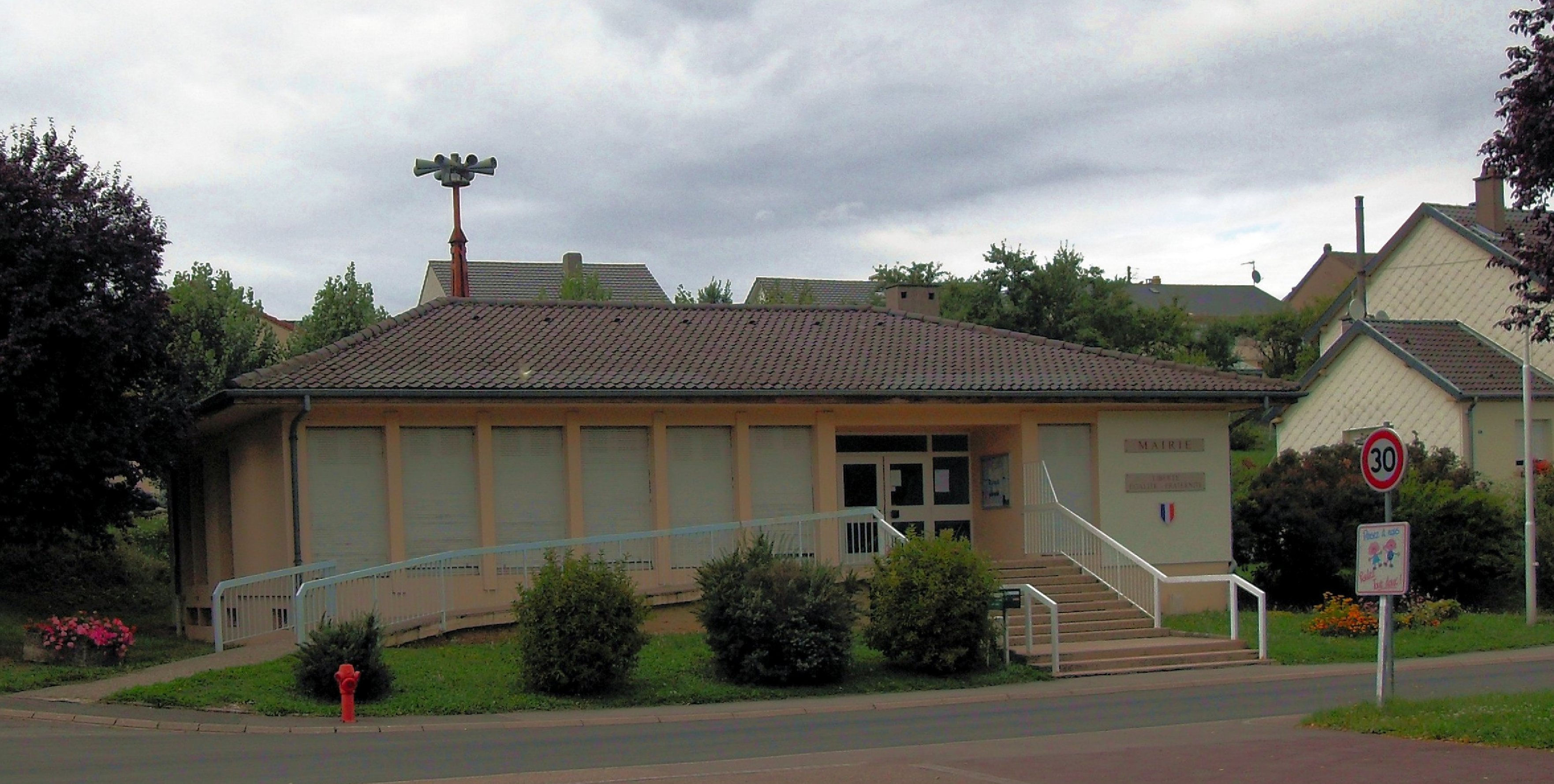 La mairie de Kédange-sur-Canner